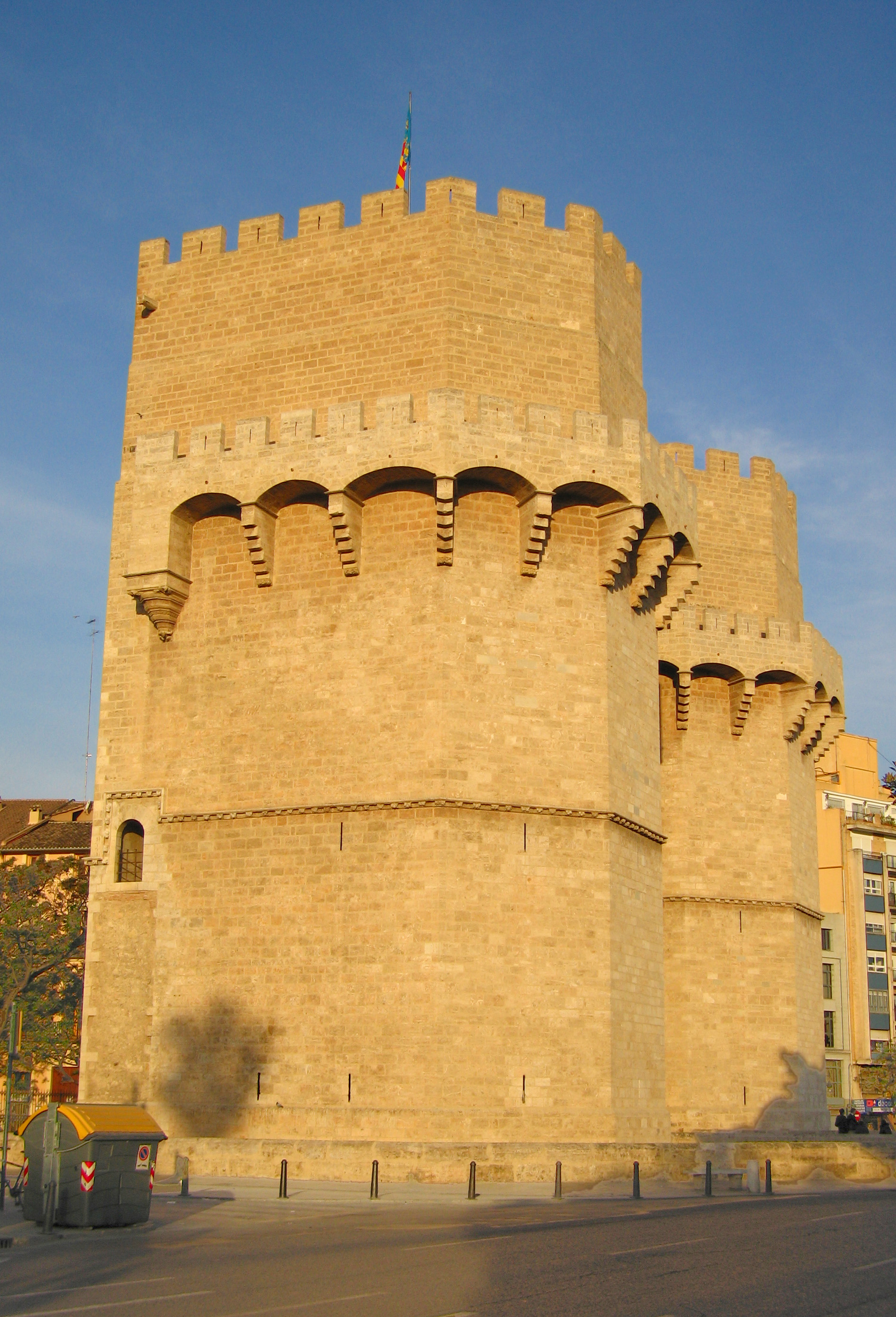 Torres de Serrans (València)